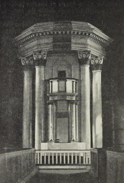 Prekestolalteret i gamle Hunn kirke (1821–1881). Ukjent fotograf. Fra Oluf Kolsrud: «Tapte kulturværdier: Christianssunds kyrkja; Frei-Kyrkja ved Christianssund; Hunns-Kyrkja i Vardal» (1915), s. 174.